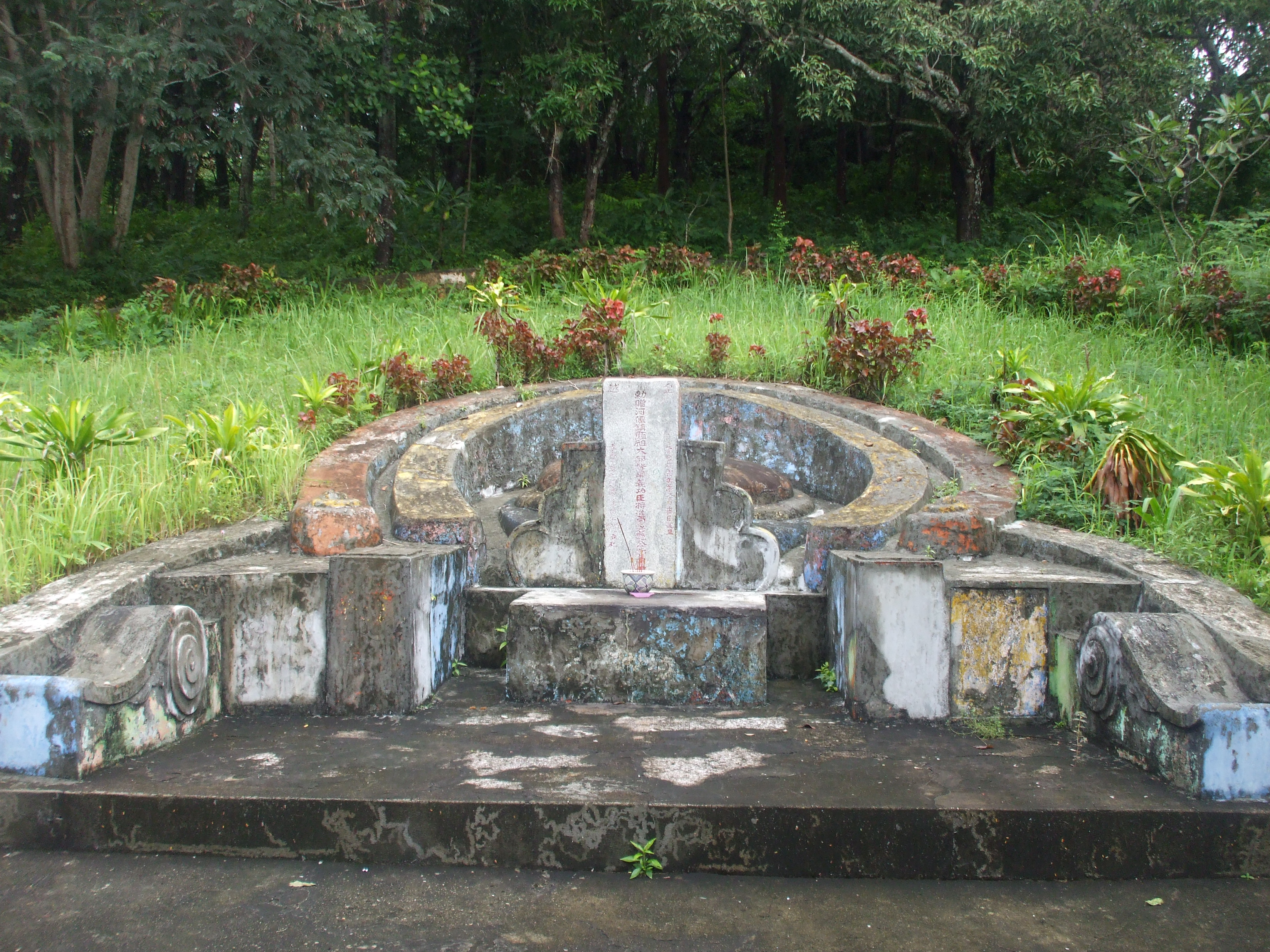 Mộ Mạc Thiên Tứ trong khu mộ dòng họ Mạc trên núi Bình San, Hà Tiên.